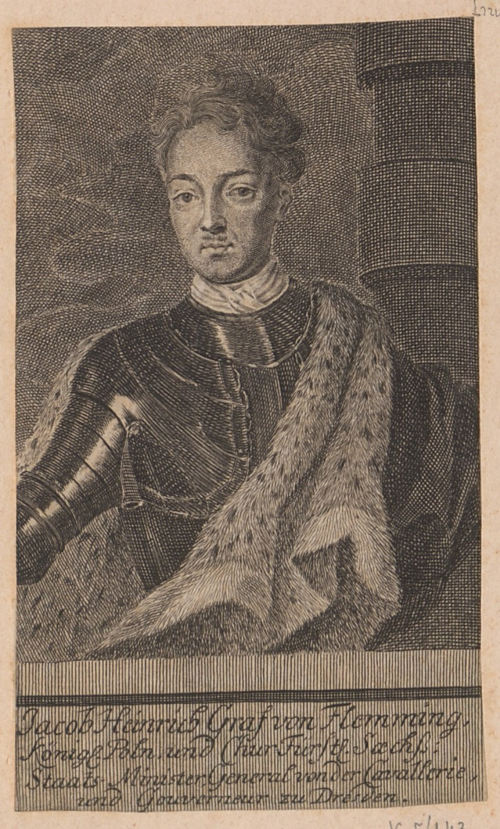 Беларуская (тарашкевіца): Партрэт Якуба Генрыка Флемінга